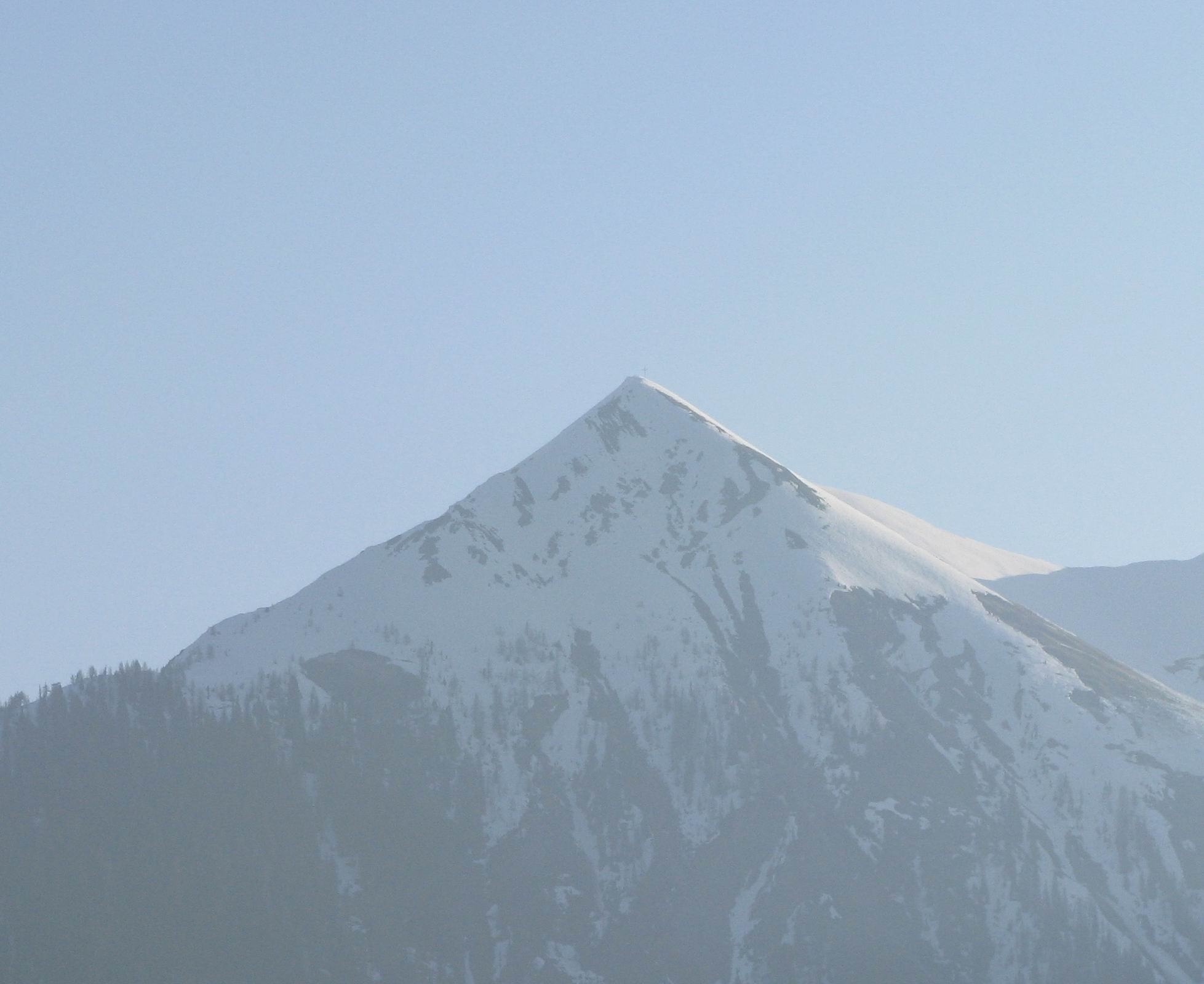 Lumkofel mit einer Höhe von 2287 m.